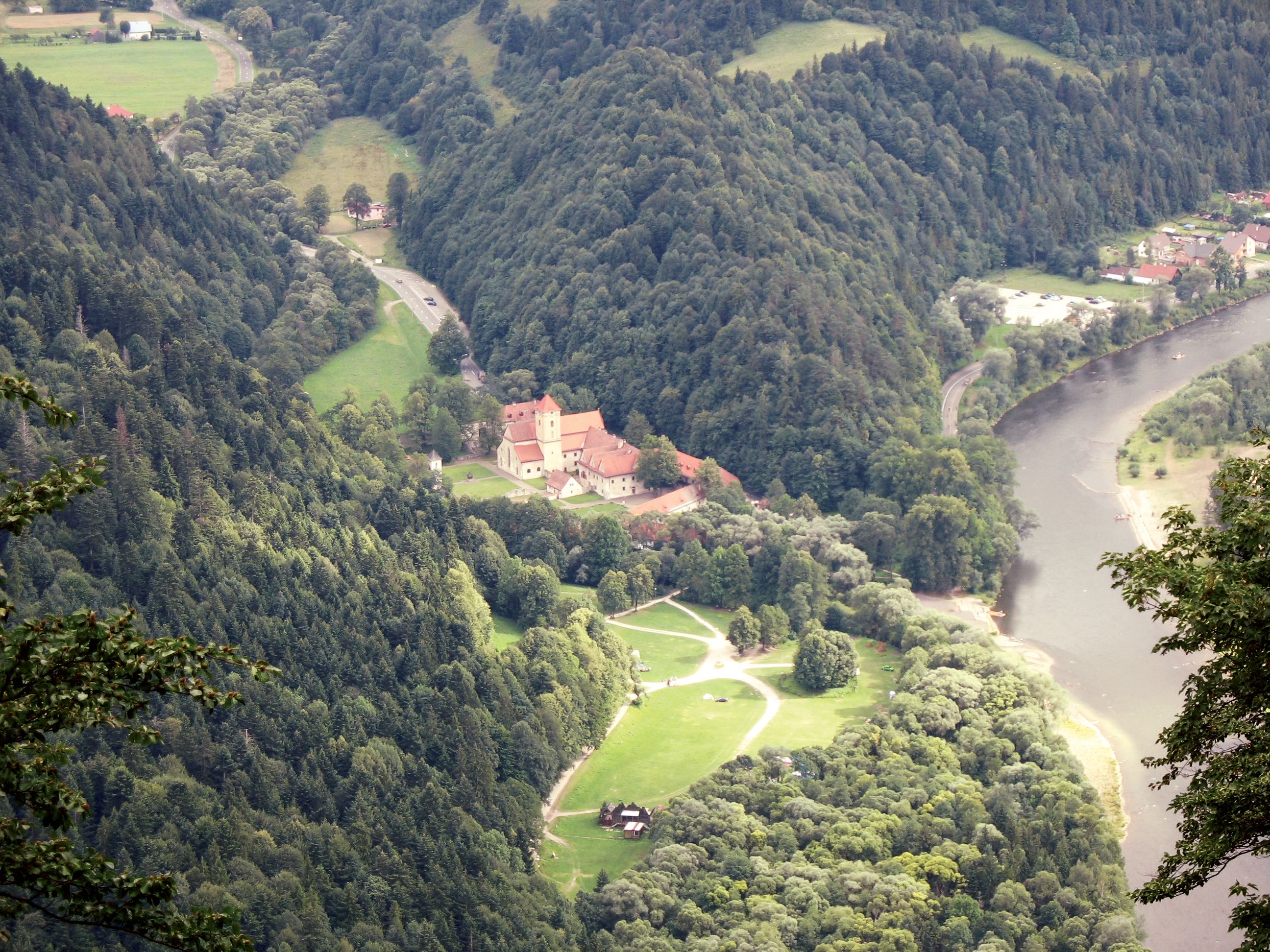 Trzy Korony - Widok na Červený Kláštor